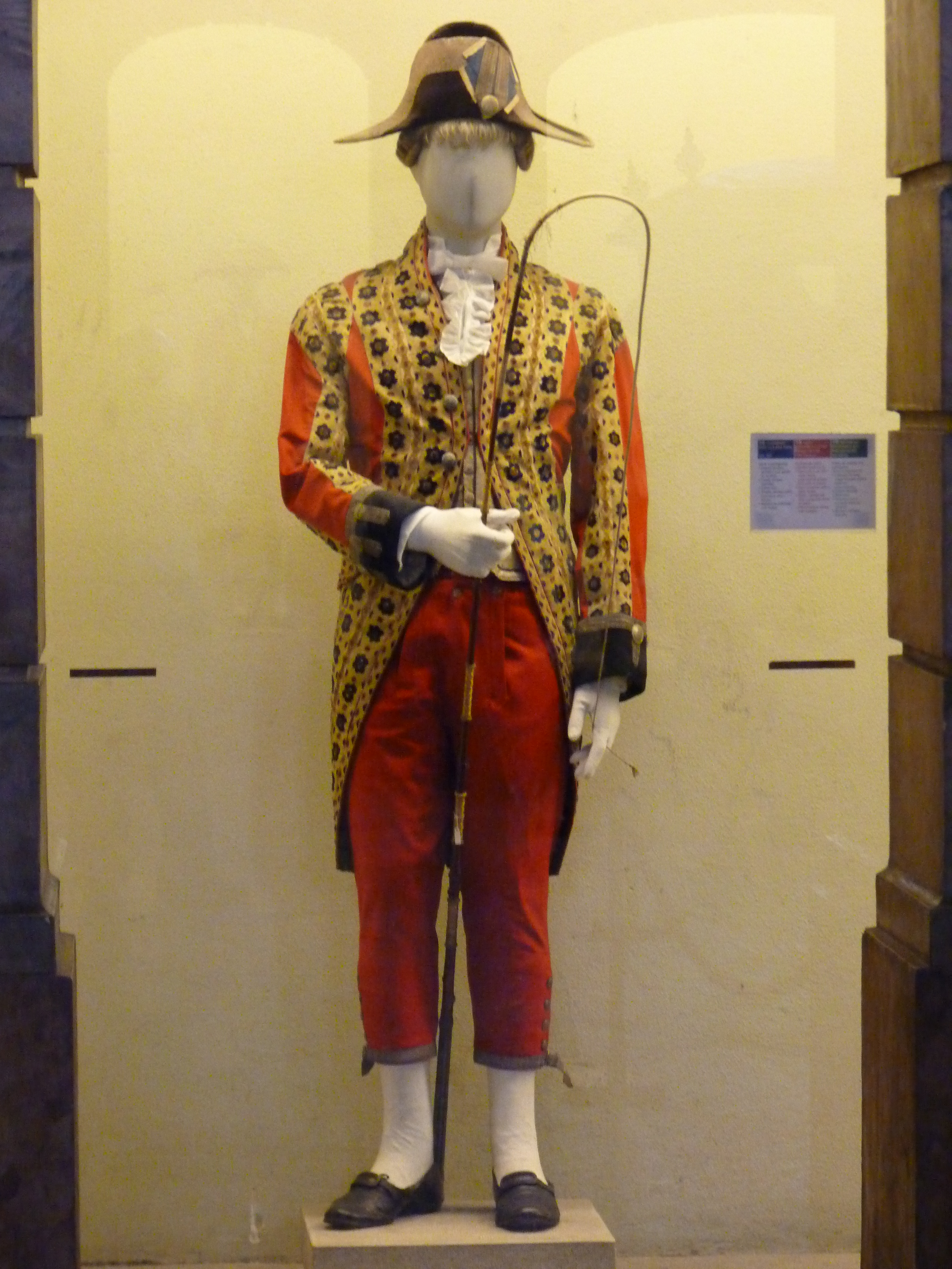 Museu Nacional dos Coches